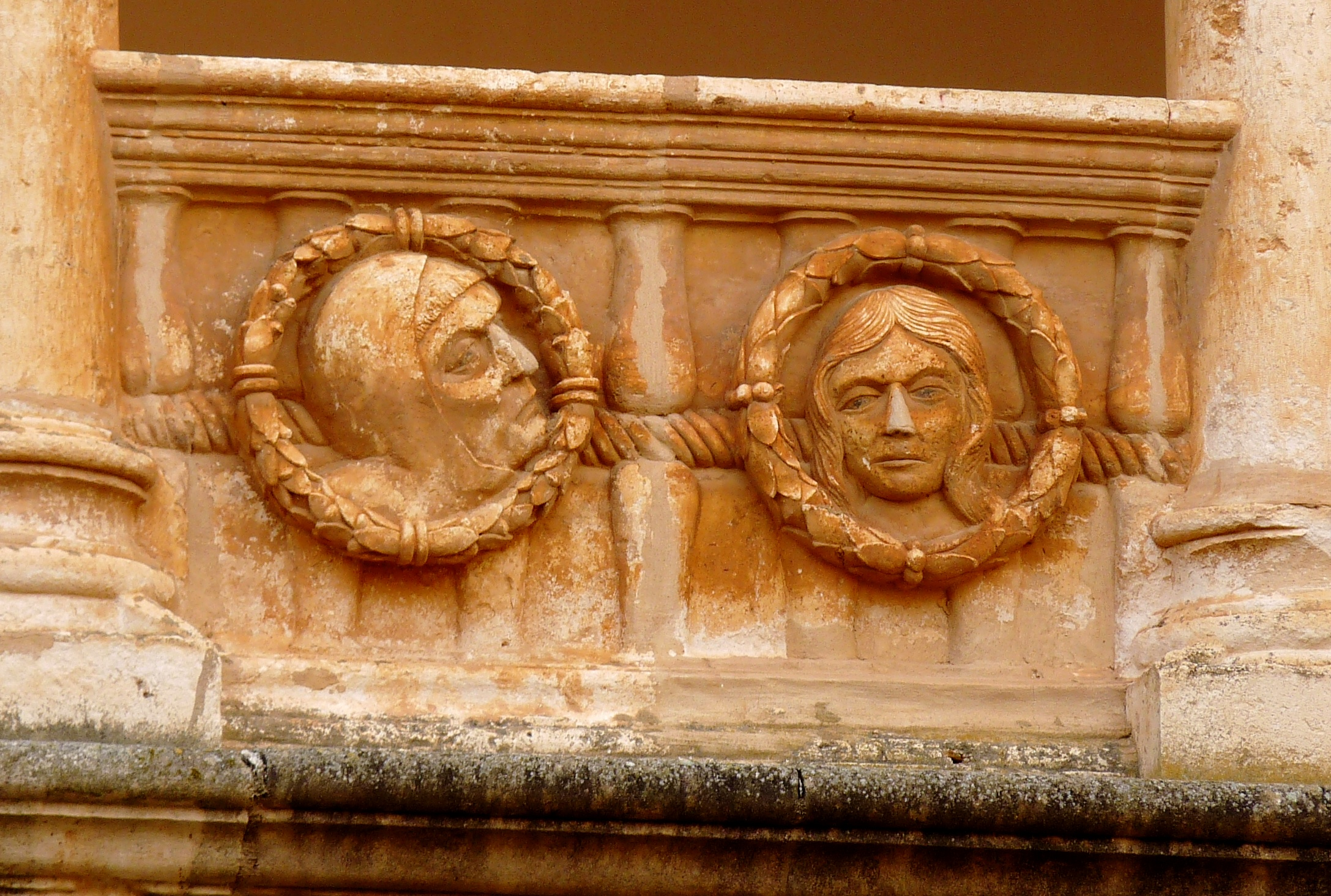 Monasterio de Santa María de Huerta - Claustro plateresco - Medallones - María de Aragón y Juan II de Castilla